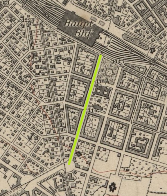 Die Reichsstraße in Dresden (markiert), 1904 (heute Fritz-Löffler-Straße)